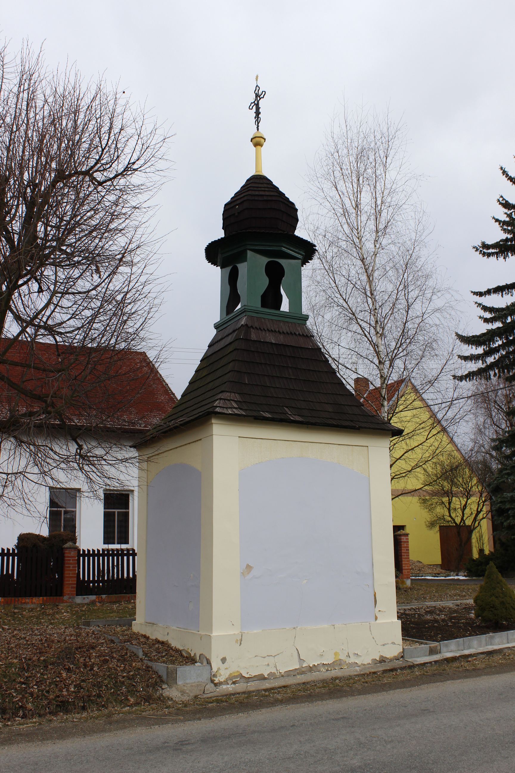 Kaplička v Pětikozlech (pohled od západu).